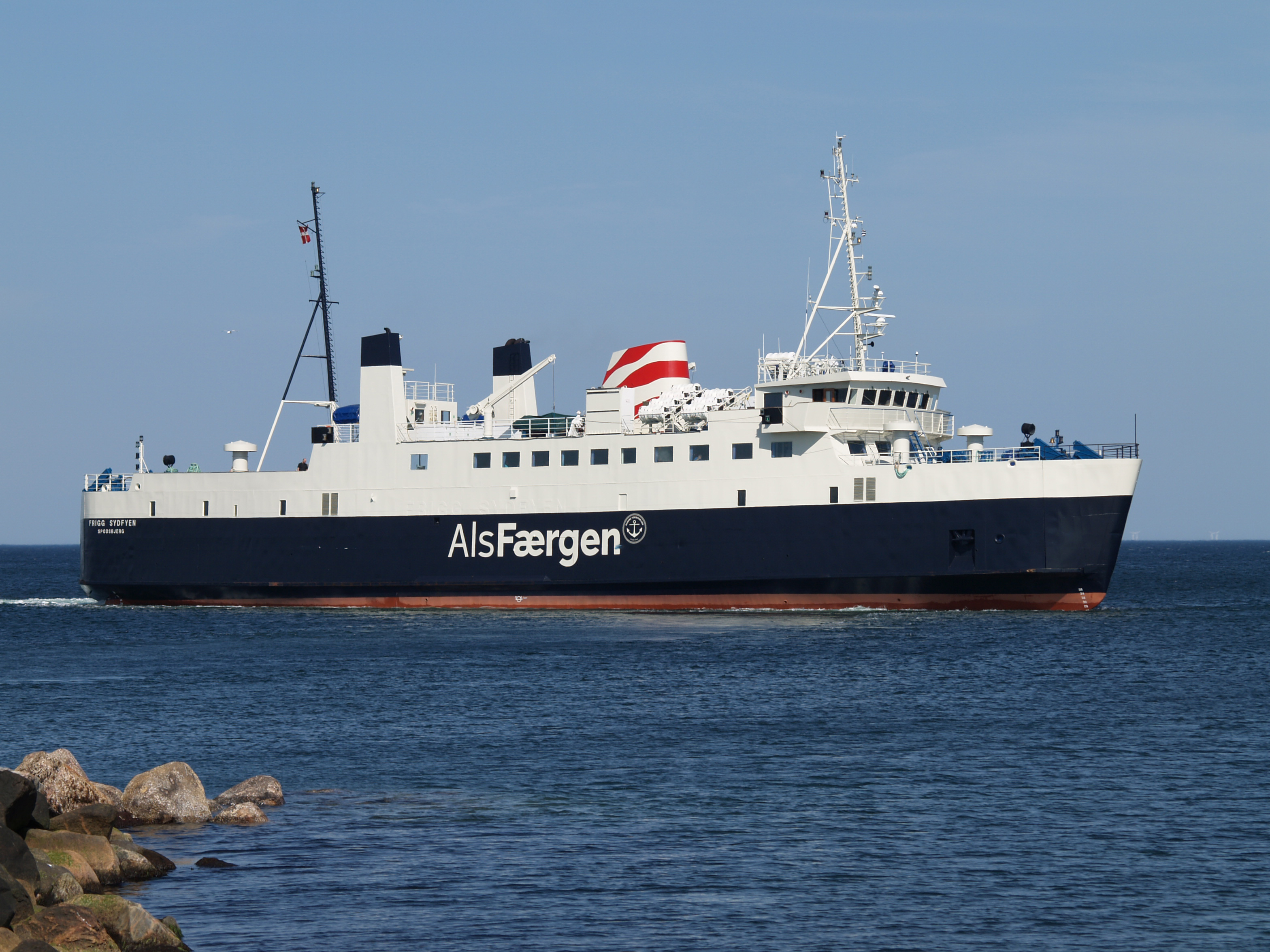 Frigg Sydfyen